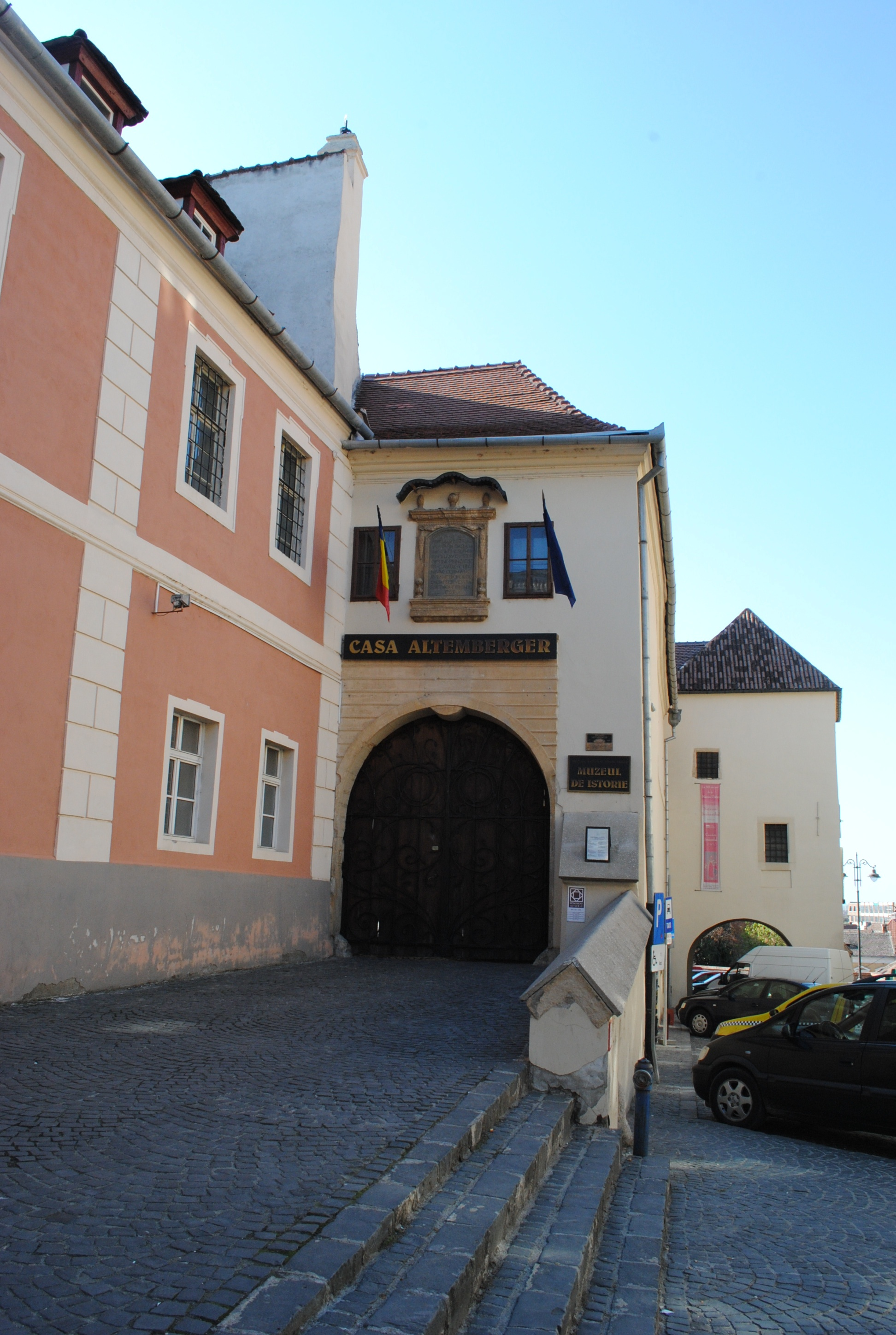 Casa Altenberger Pempflinger (Primăria Veche), azi Muzeul de Istorie, sec. XIV - XVIII